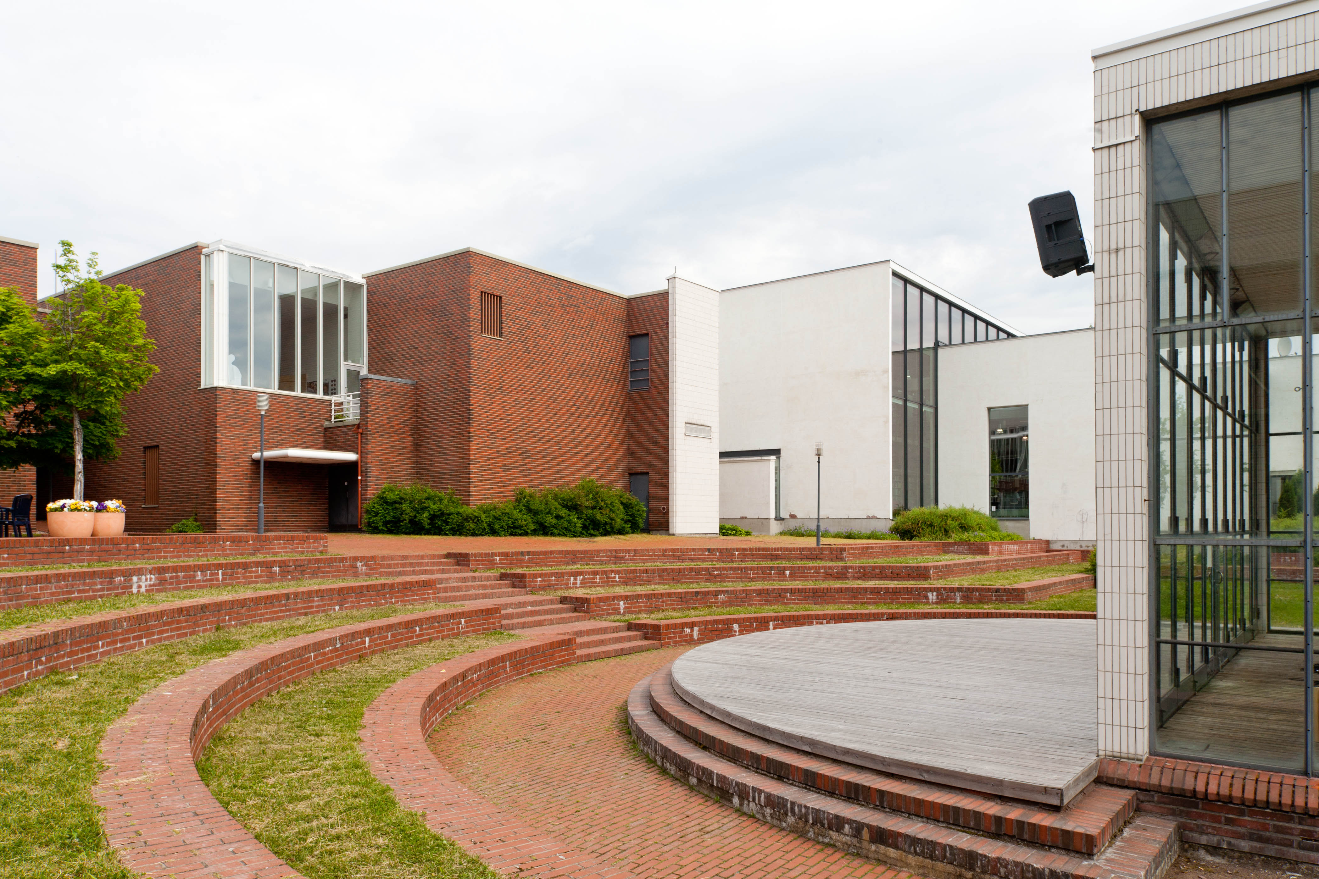 Kuusankoskitalo in Kuusankoski, Finland. Architect: Brunow & Maunula, 1985.